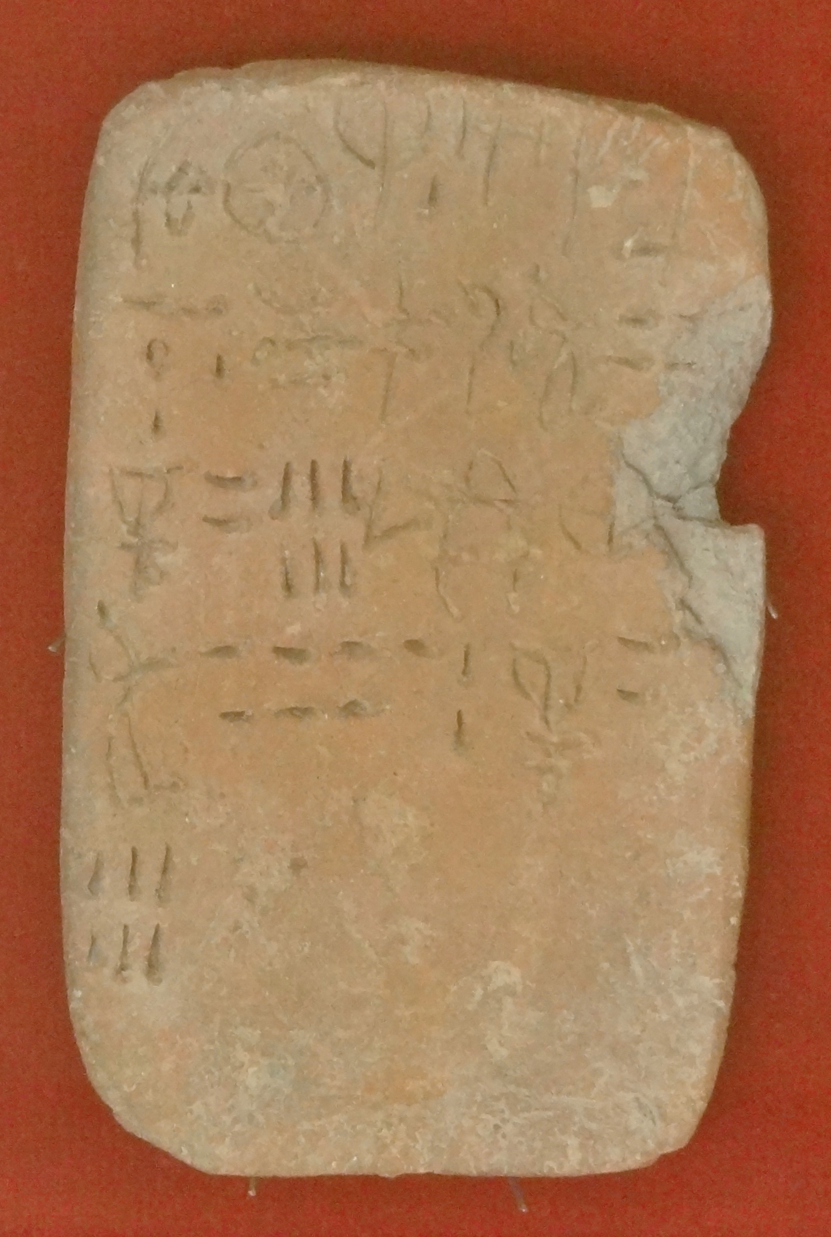 Tontafel mit Linearschrift A aus dem Palast von Petras, Archäologisches Museum von Sitia, Kreta, Griechenland